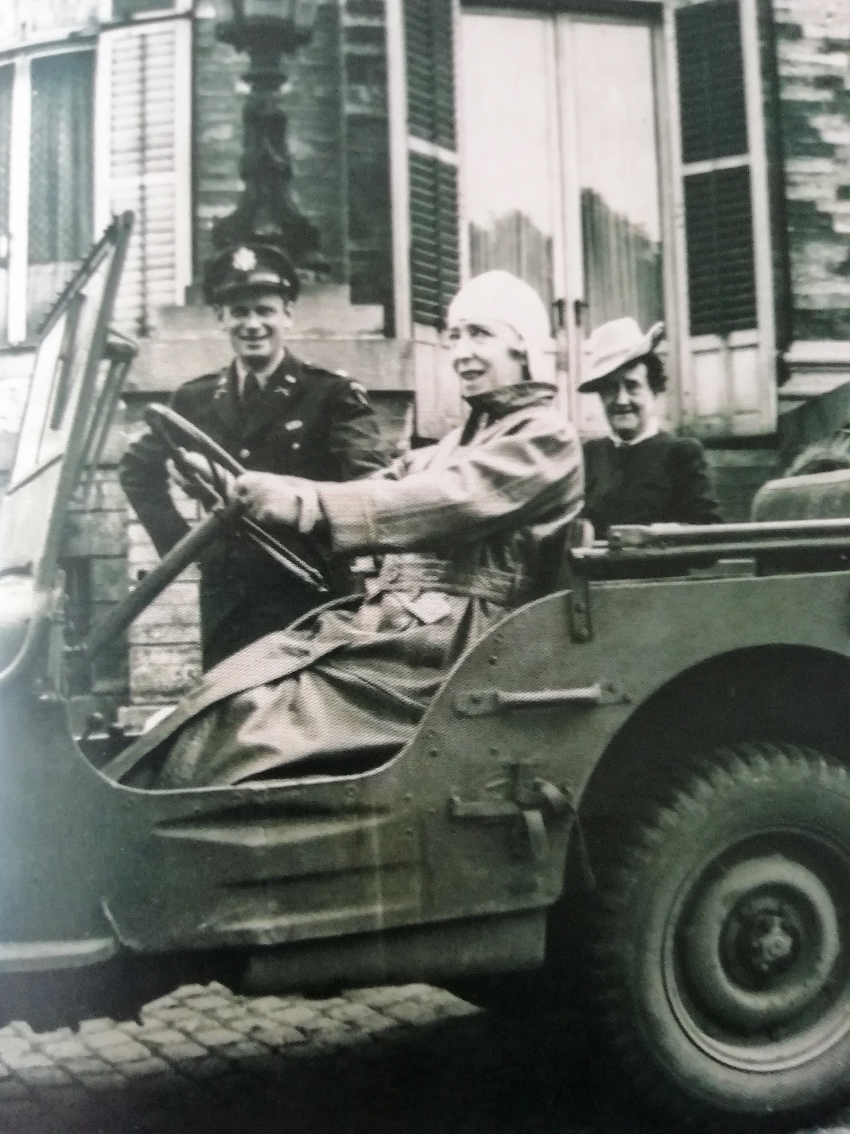 La reine Elisabeth au volant d'une Jeep en 1945 au château de Laeken